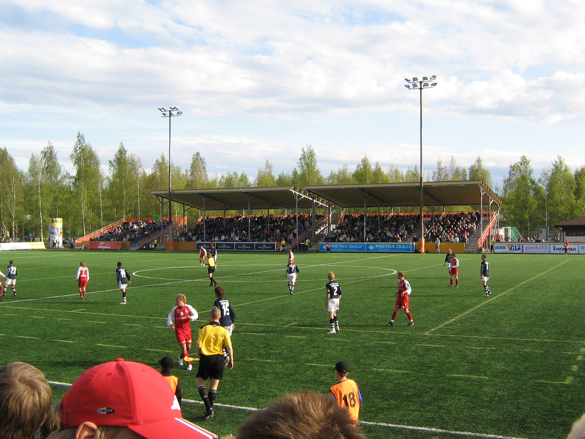 ACO-MyPa 27.5.2007, Castrenin kenttä